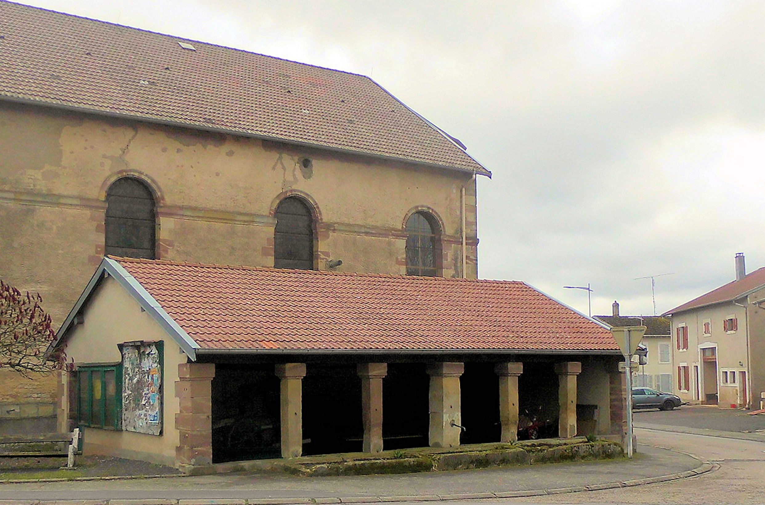 L'ancien lavoir de Saint-Pierremont